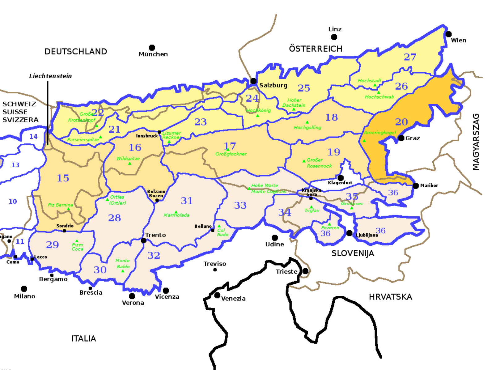 Alpi Orientali secondo la SOIUSA con evidenziate le Prealpi di Stiria